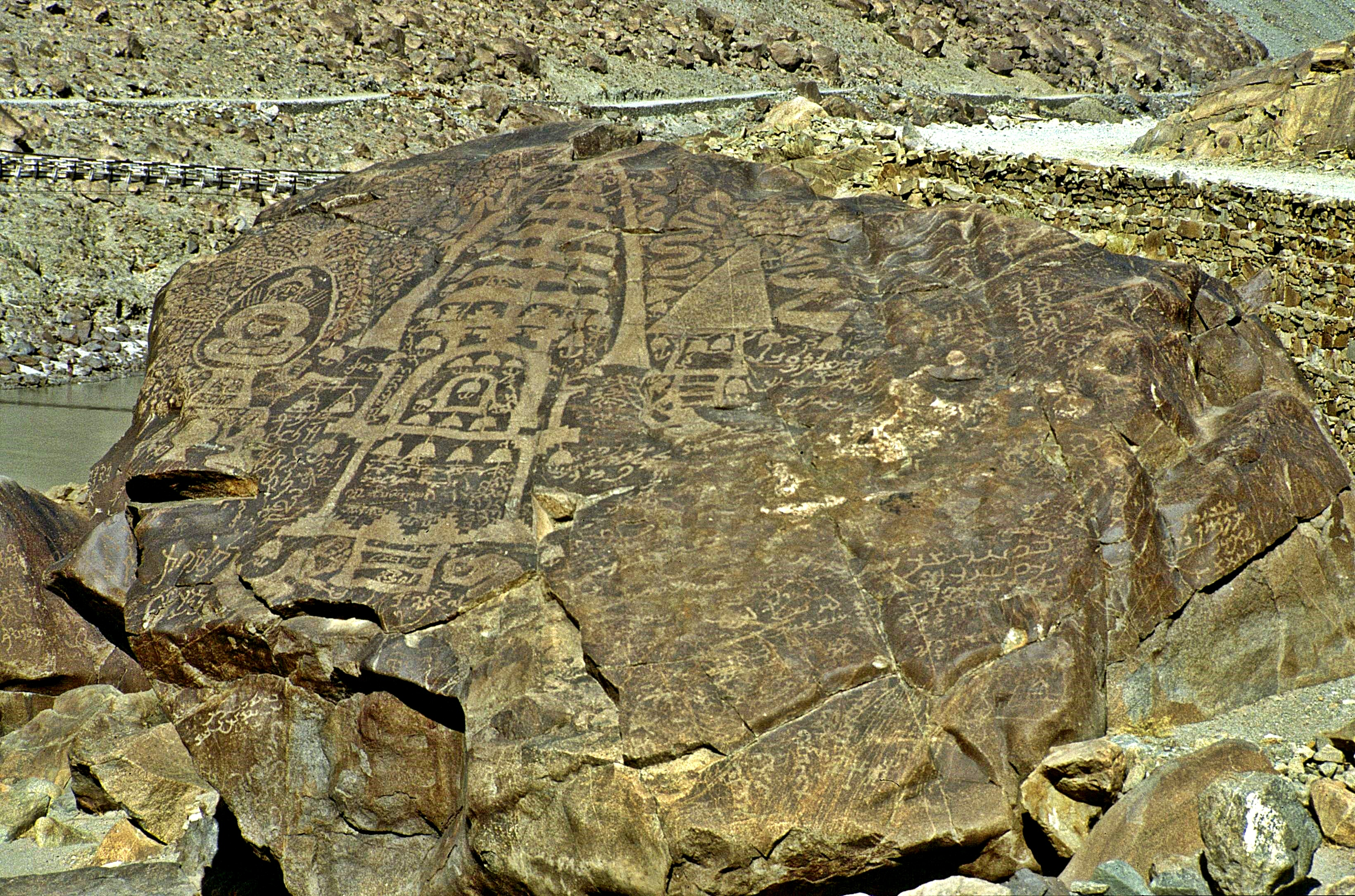 Felsbilder am Karakorum-Highway bei Shatial